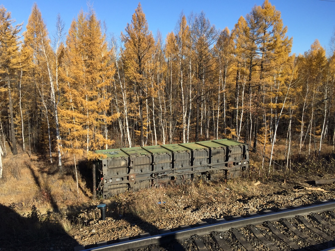 Сход вагонов на перегоне Жанна - Чичатка,Забайкальская жд, 27.09.2015.